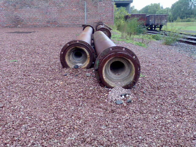 Durch Ausfällungen aus Grubenwasser zugesetztes Rohrleitung auf einer Steinkohlenzeche